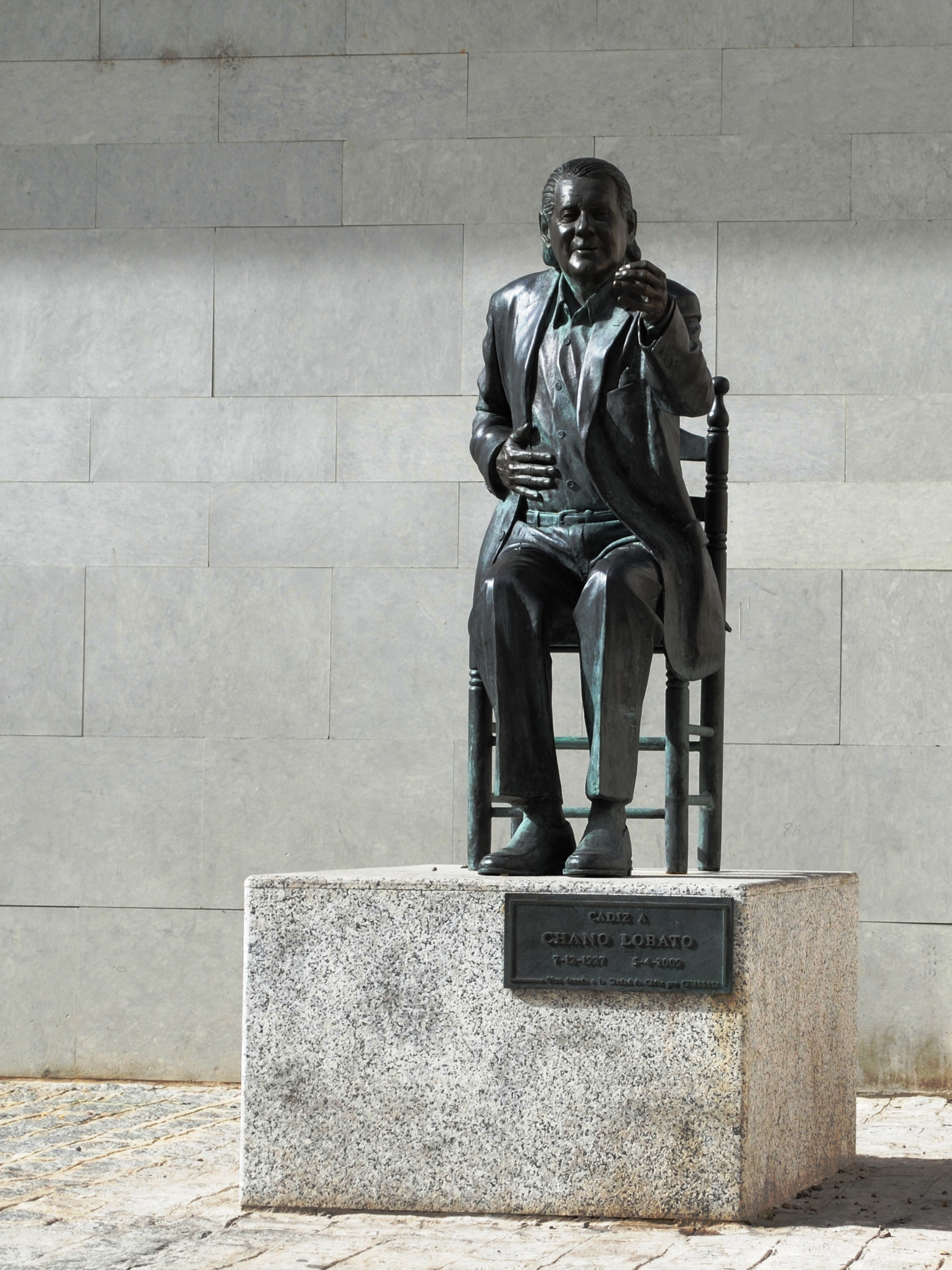 Chano Lobato por el escultor José Antonio Barberá Briones.